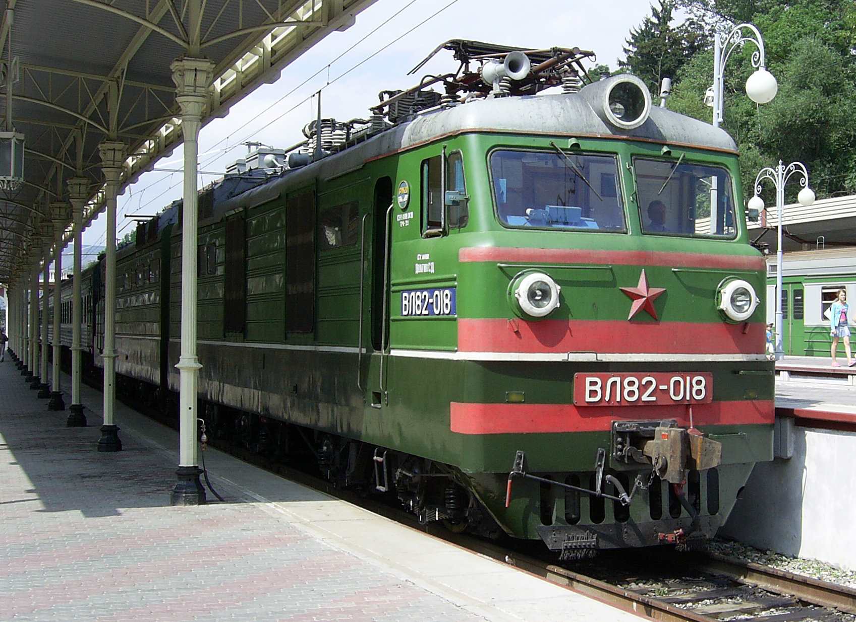 Soviet electric locomotive VL82